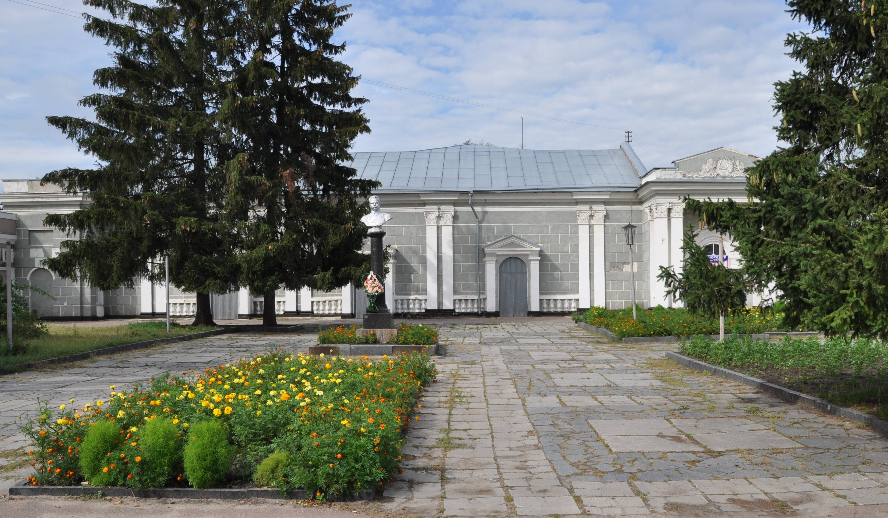 Вул. К.Лібкнехта, 35. На розі вулиць Карла Лібкнехта та Садової перед однойменним кінотеатром встановлено бюст радянському воєначальнику Михайлу Васильовичу Фрунзе (1885-1925). Пам'ятник відкрито 6 листопада 1948 року. Автор скульптури В. Поліщук. Бюст М. Фрунзе розміщений на стелі з граніту. Висота стели – 4 м. Був демонтований під час подій зими 2014.